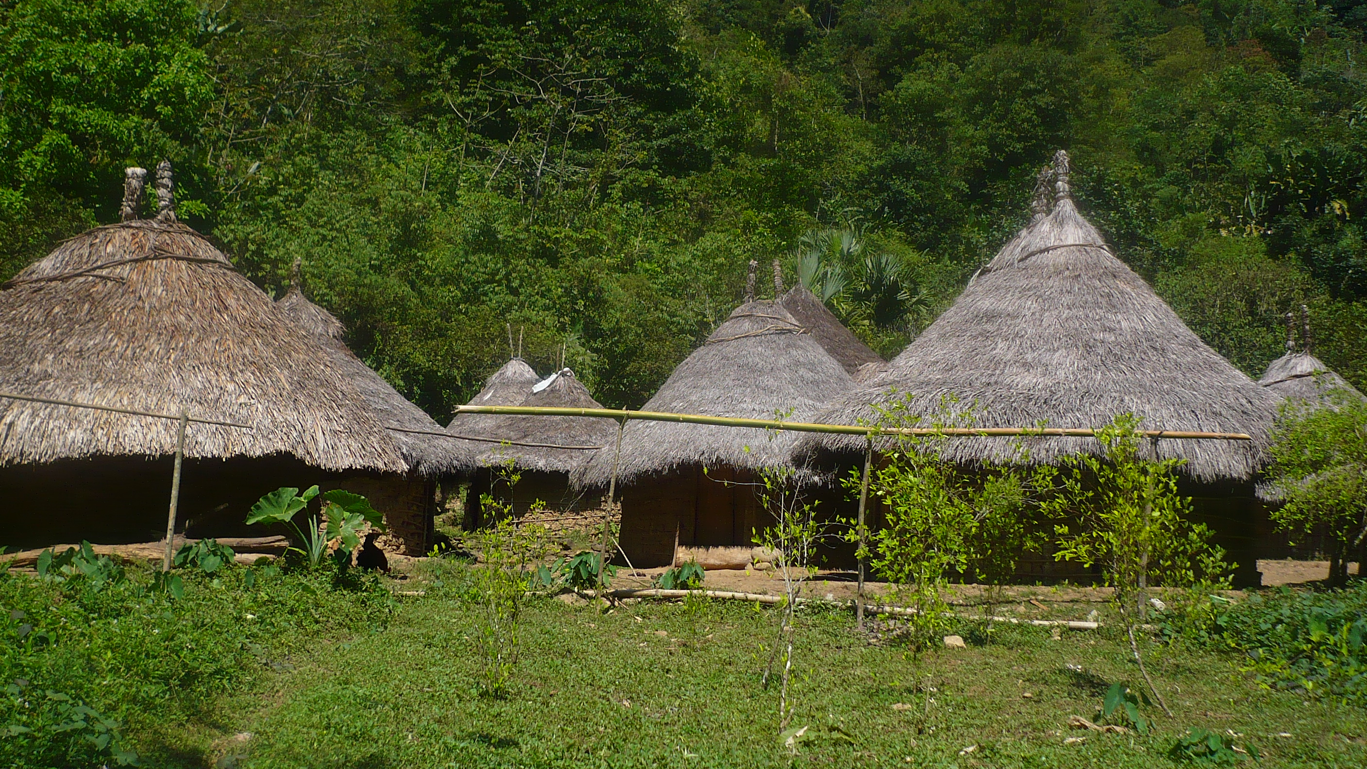 Village cérémoniel Kogi sur le chemin menant à la Ciudad Perdida